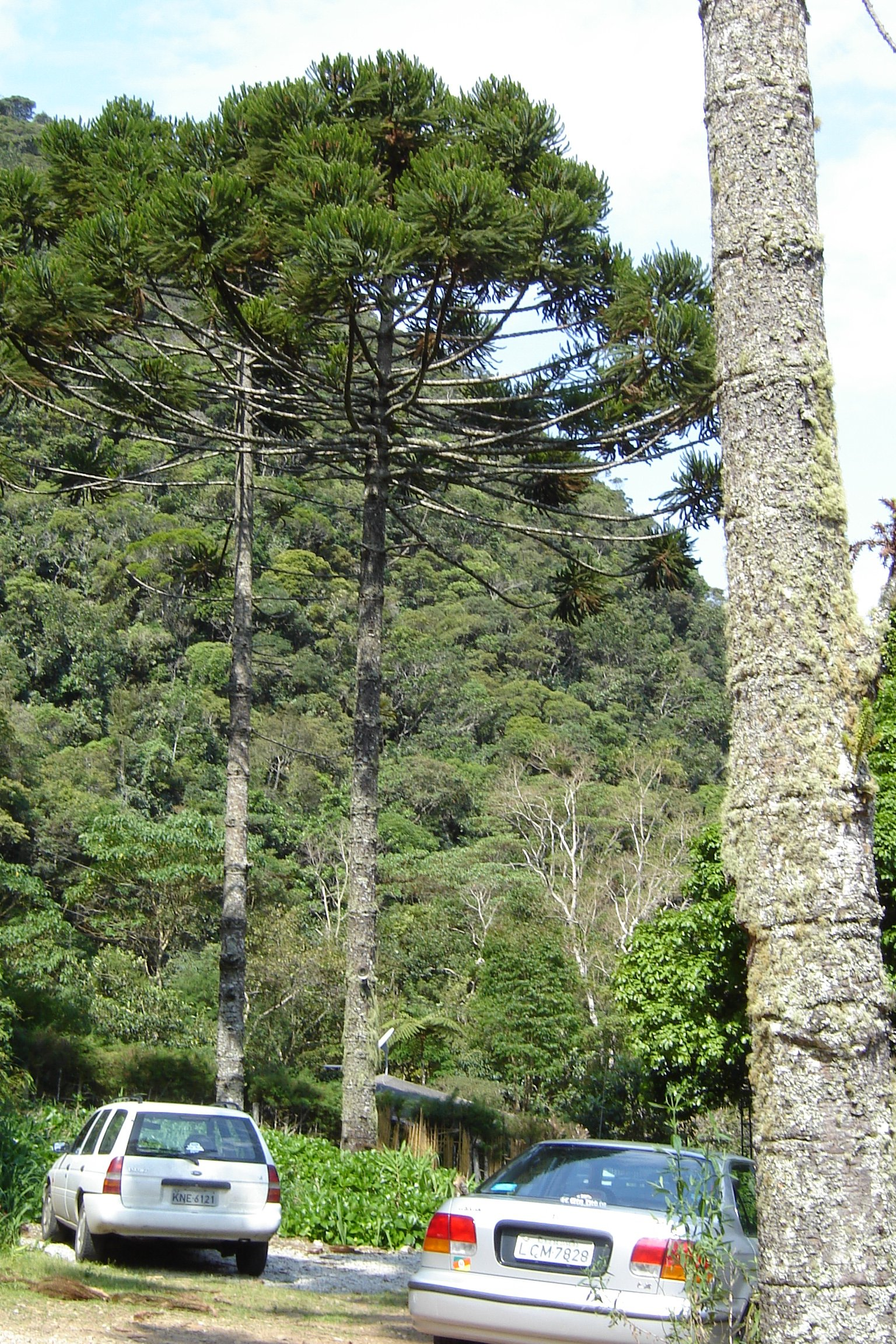 Araucaria angustifolia. Some trees from Petrópolis, Rio de Janeiro.